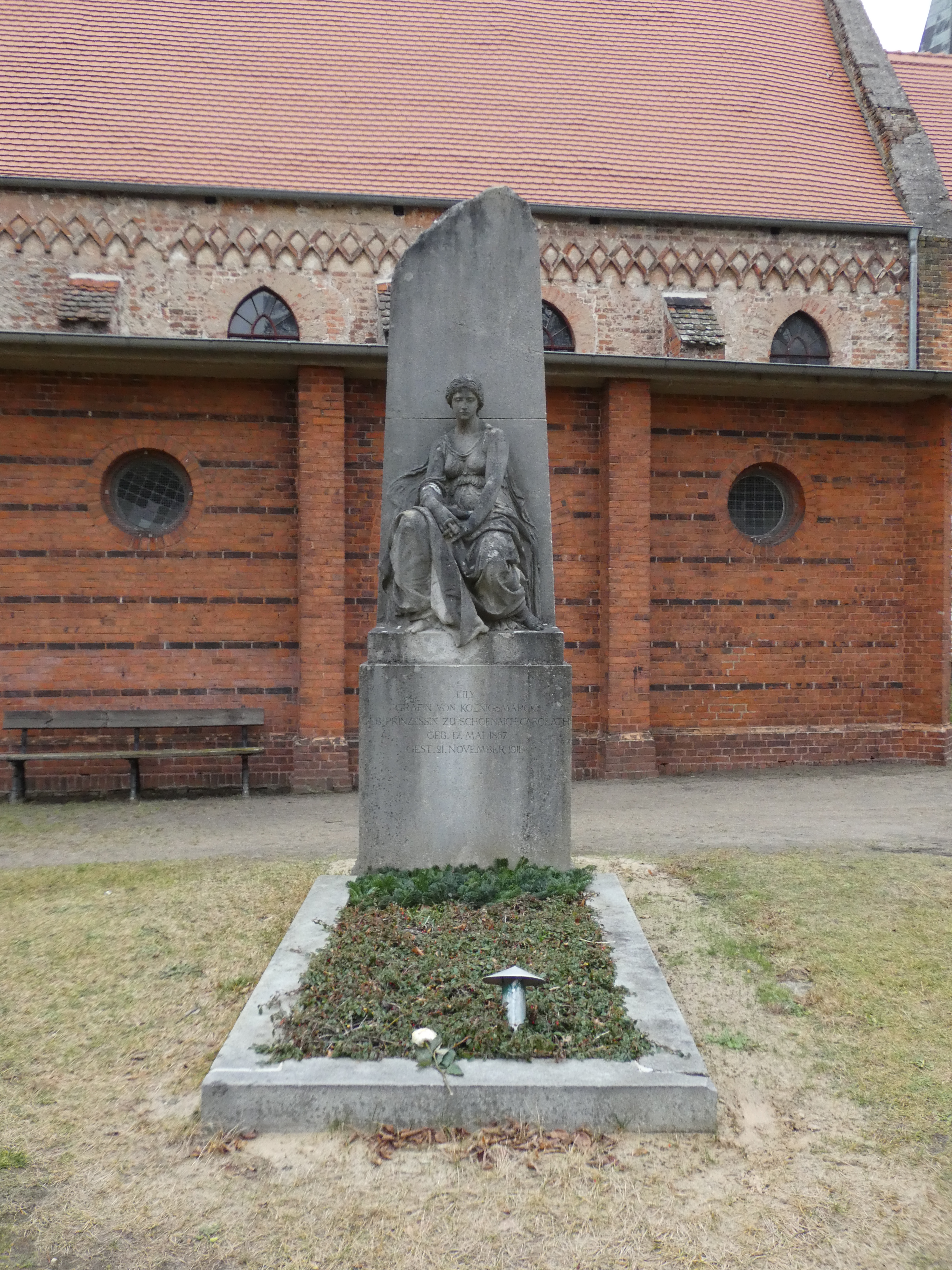 Grabmal von Lily Gräfin von Koenigsmarck, Kirchhof der Pfarrkirche Plaue